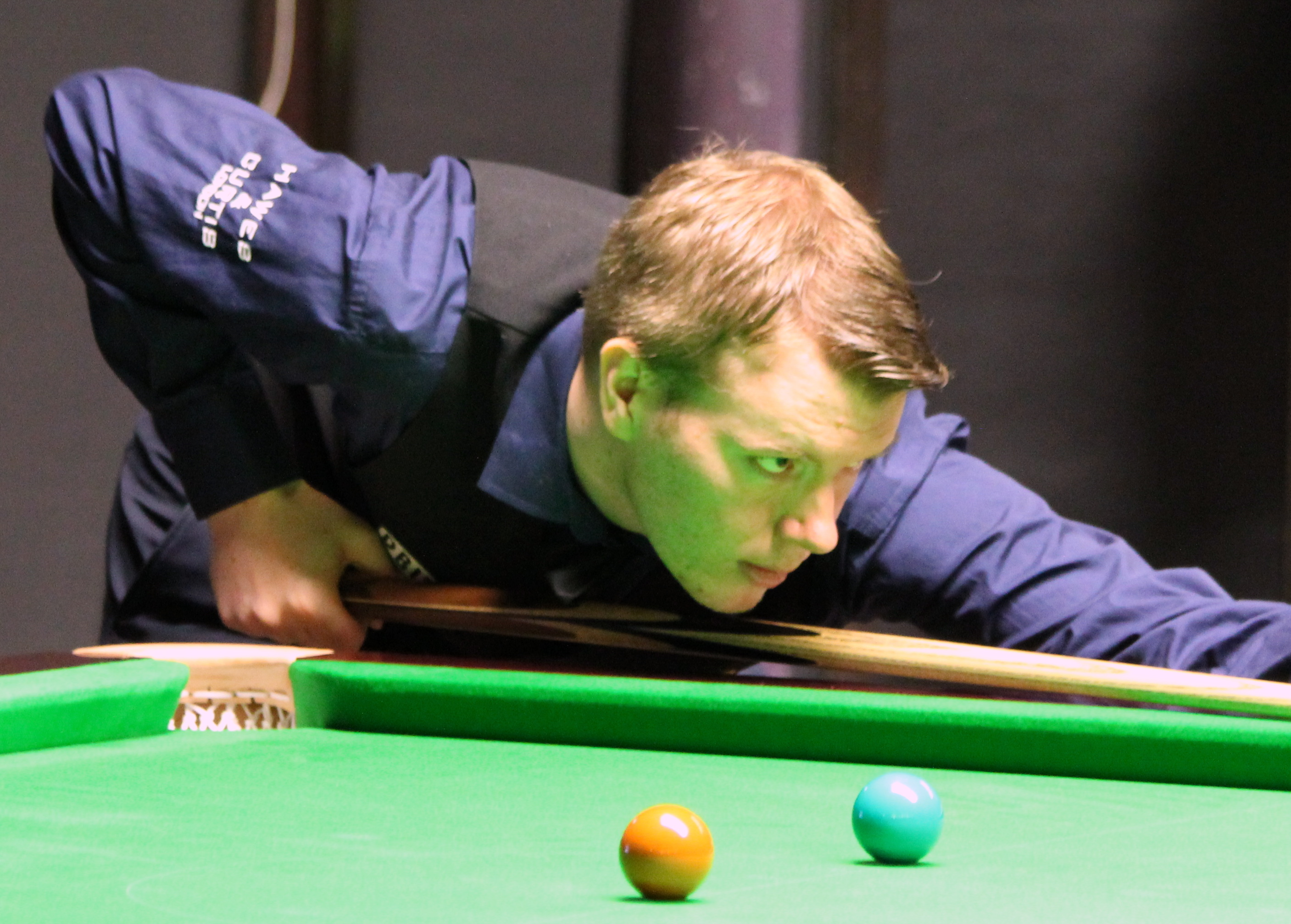 Patrick Einsle beim Paul Hunter Classic 2016